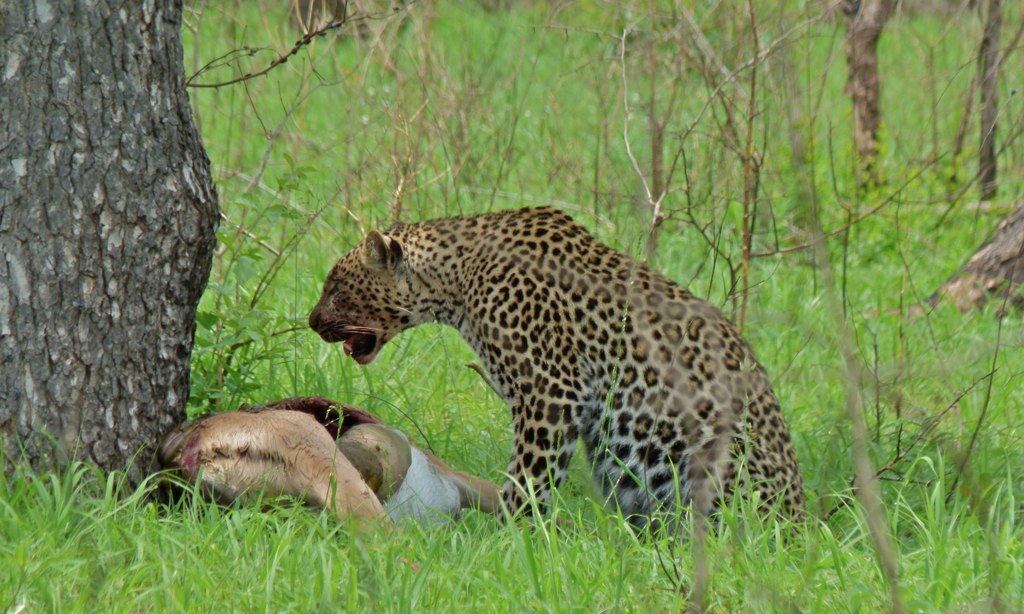 H1-2 near Kruger Plaque, Kruger NP, SOUTH AFRICA